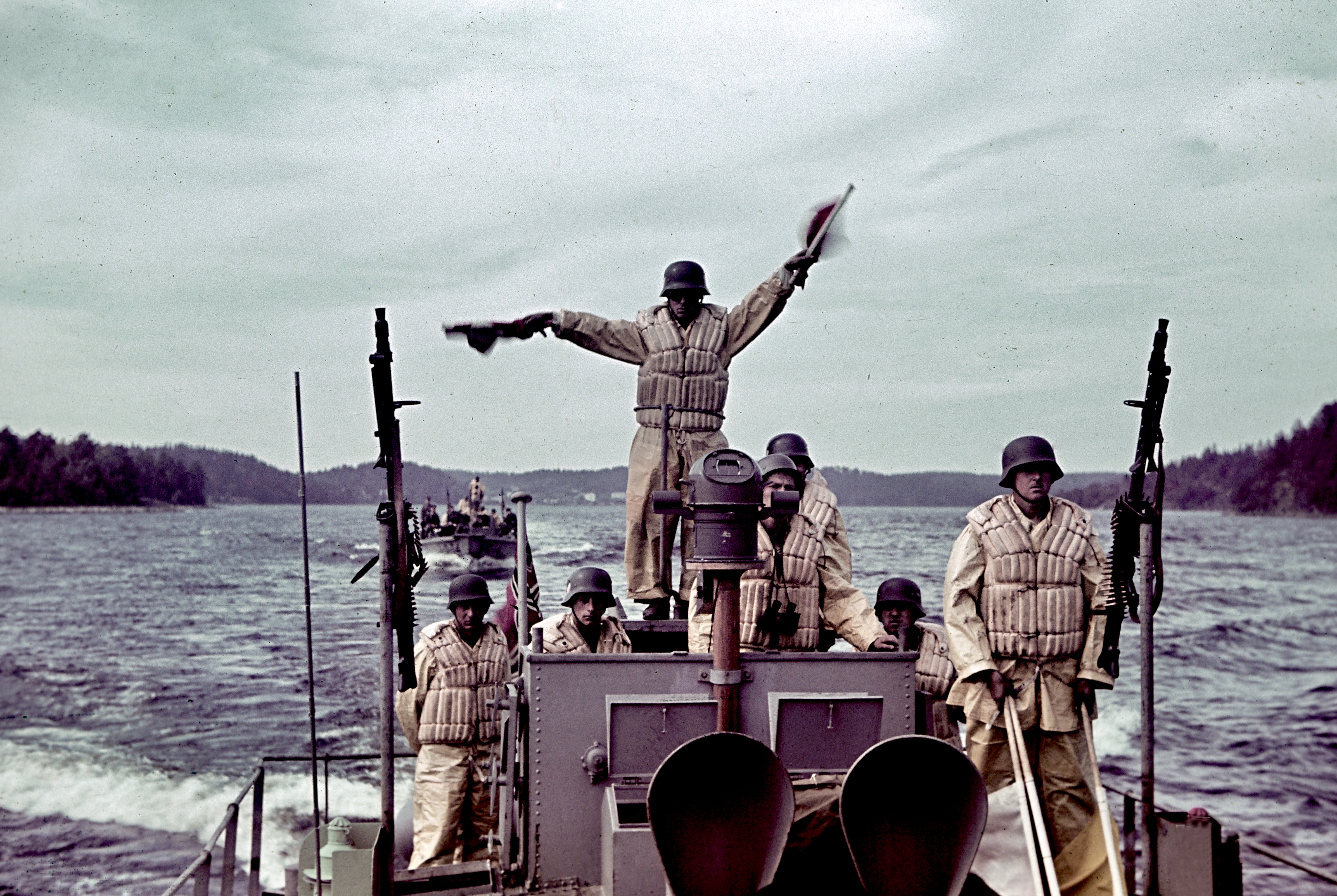 Saksalaisen laivasto-osaston (Einsatzstab Fähre Ost) paraatista Lahdenpohjasta.